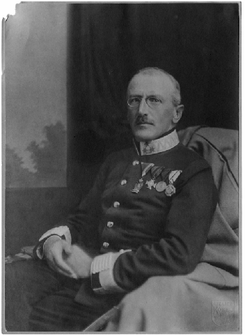 general pješaštva, podmaršal Ivan grof Salis-Seewis (1863.-1940.)